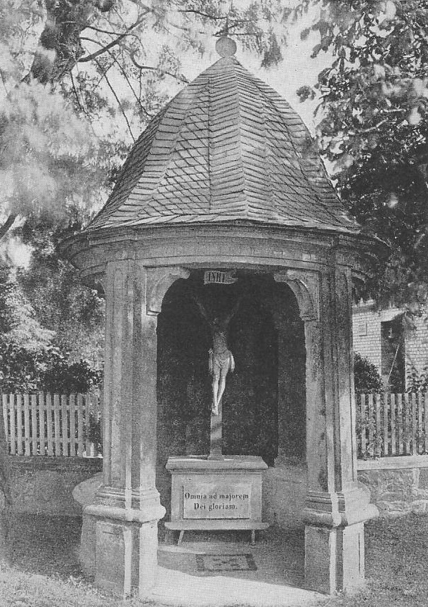 eh. Brunnenhaus des Klosters